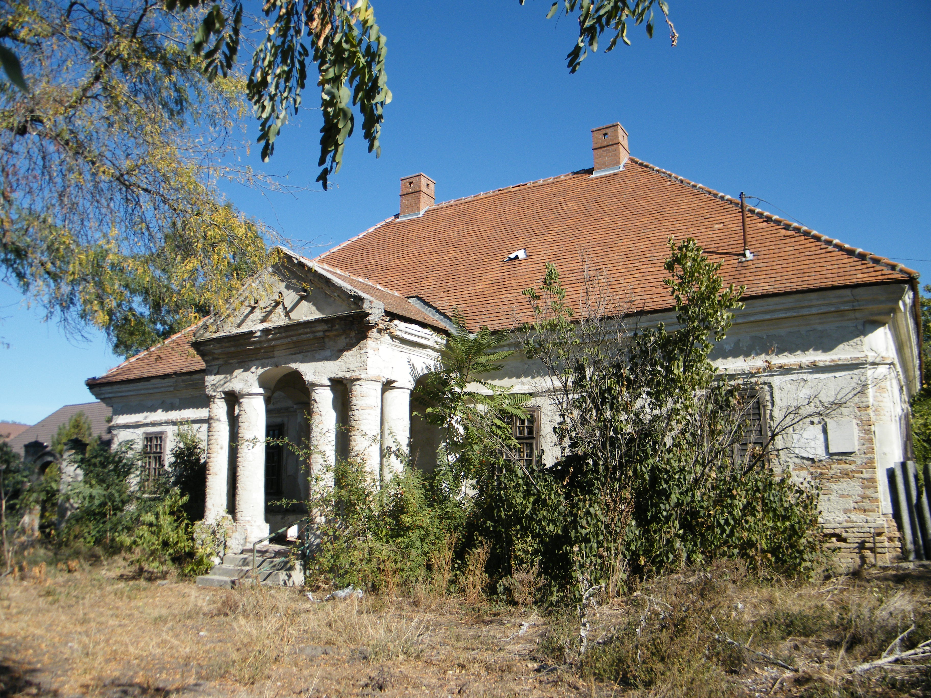 volt Vigyázó-kúria (Abony, Tószegi út 51.) This is a photo of a monument in Hungary, Identifier: 6873